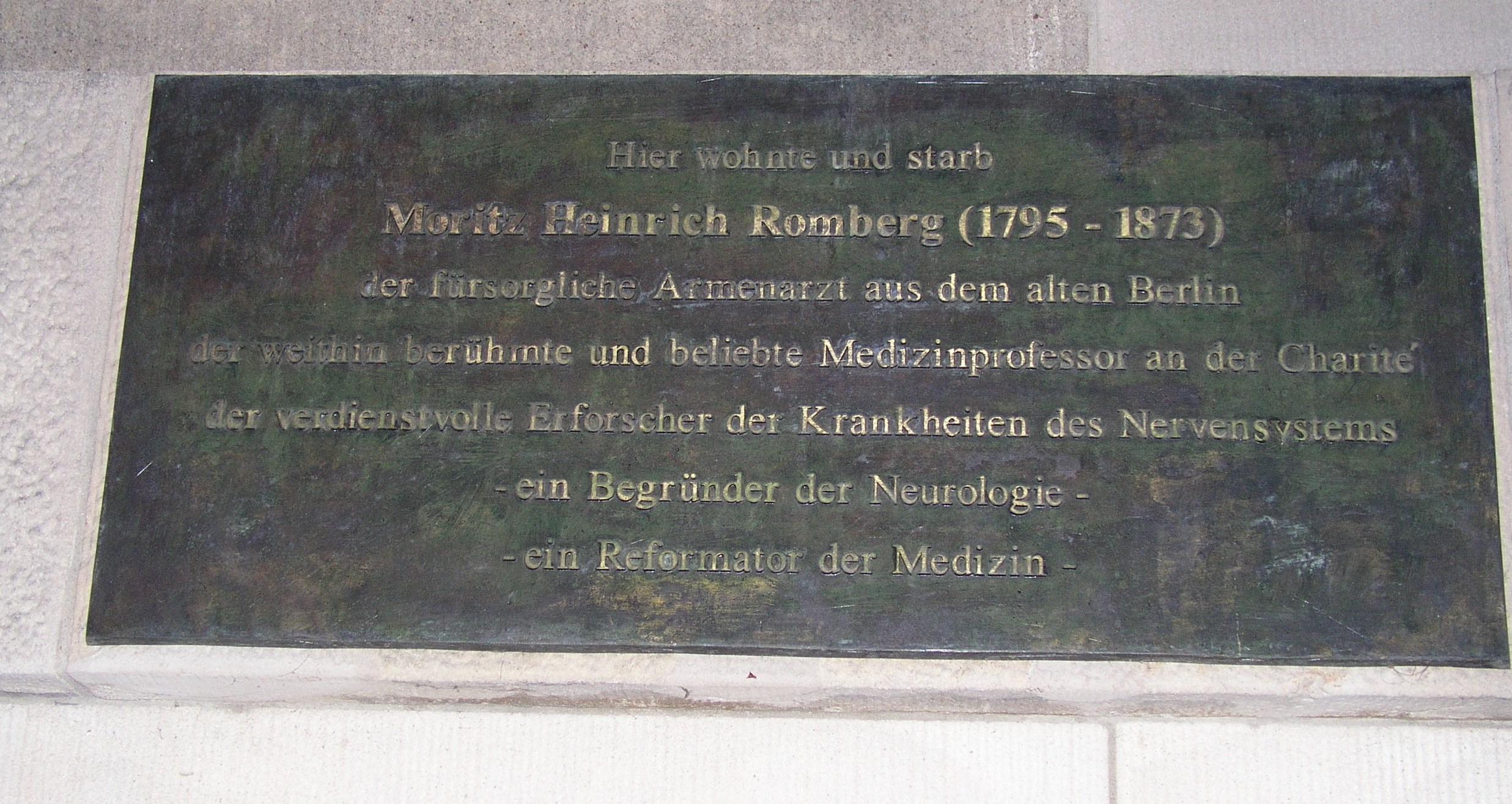 Gedenktafel für Moritz Heinrich Romberg in Berlin-Mitte